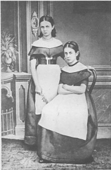 Lidija (1853-1920) e Vera Figner (1852-1942)